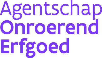 Entiteitslogo van het agentschap Onroerend Erfgoed